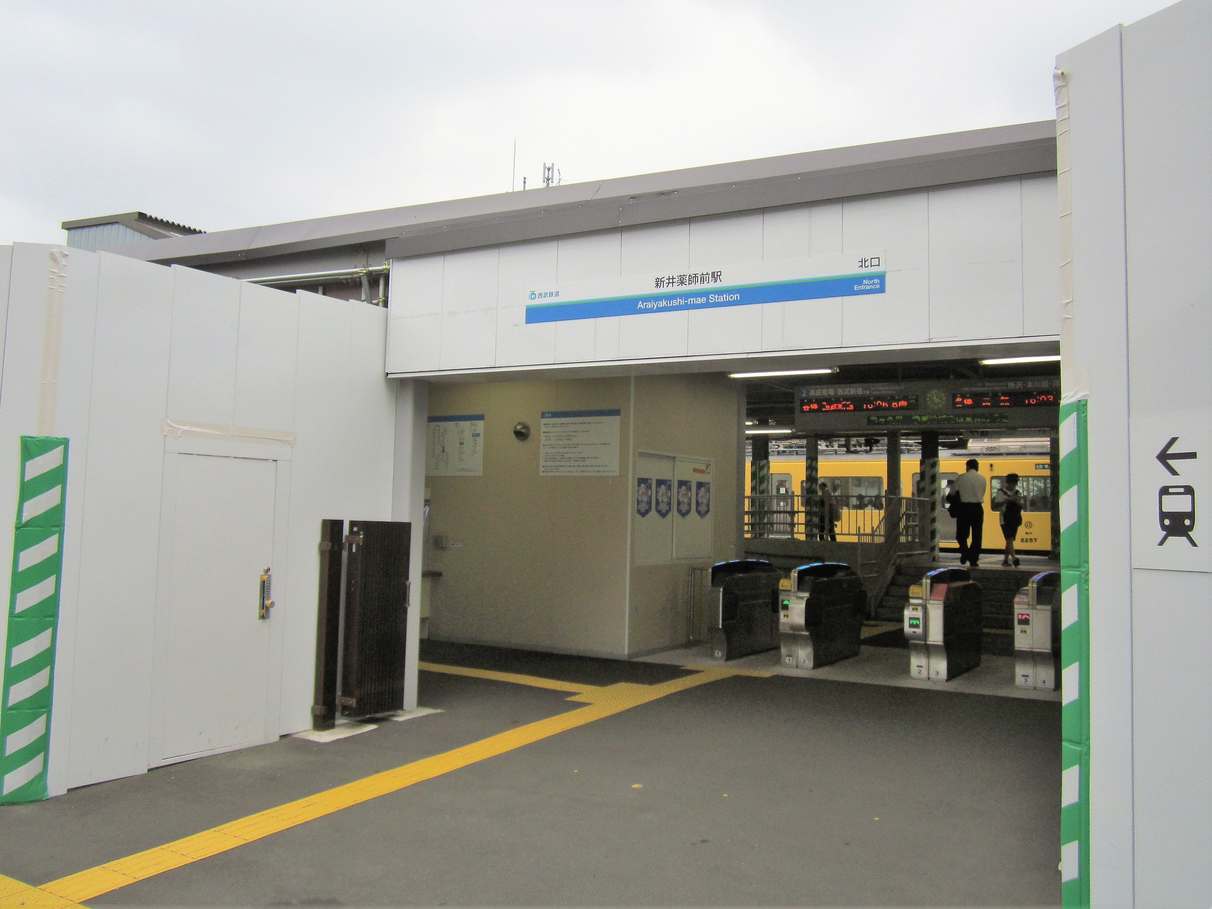 新井薬師前駅・仮設北口（2019年7月）